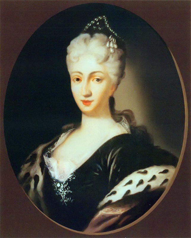 Беларуская (тарашкевіца): Партрэт Марыі Кацярыны Радзівіл (Maryja Kaciaryna Radzivił) з роду дэ Бецюн (de Béthune)